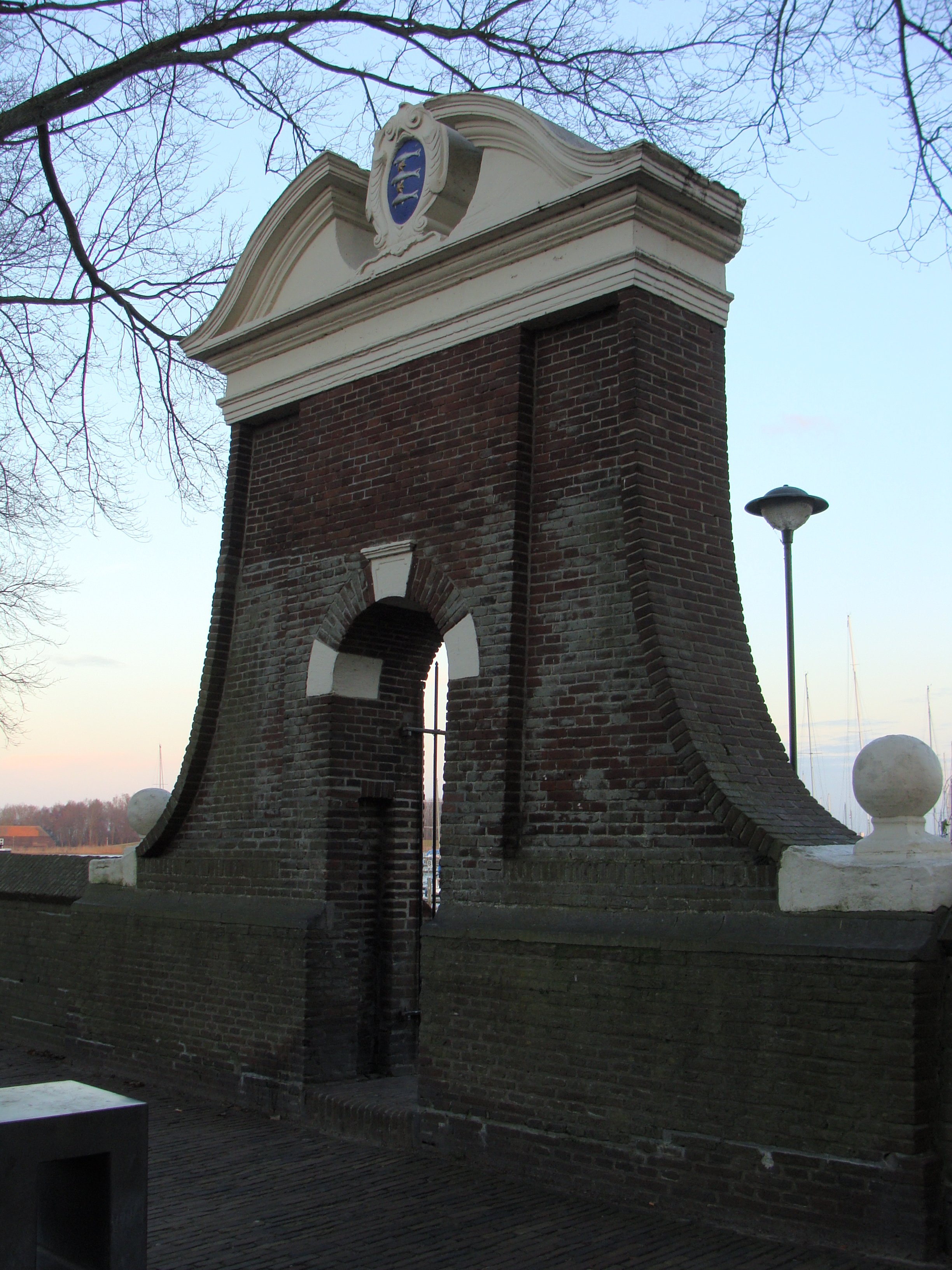 Het Staverse Poortje in Enkhuizen, vanouds de enige doorgang in de Zeemuur.